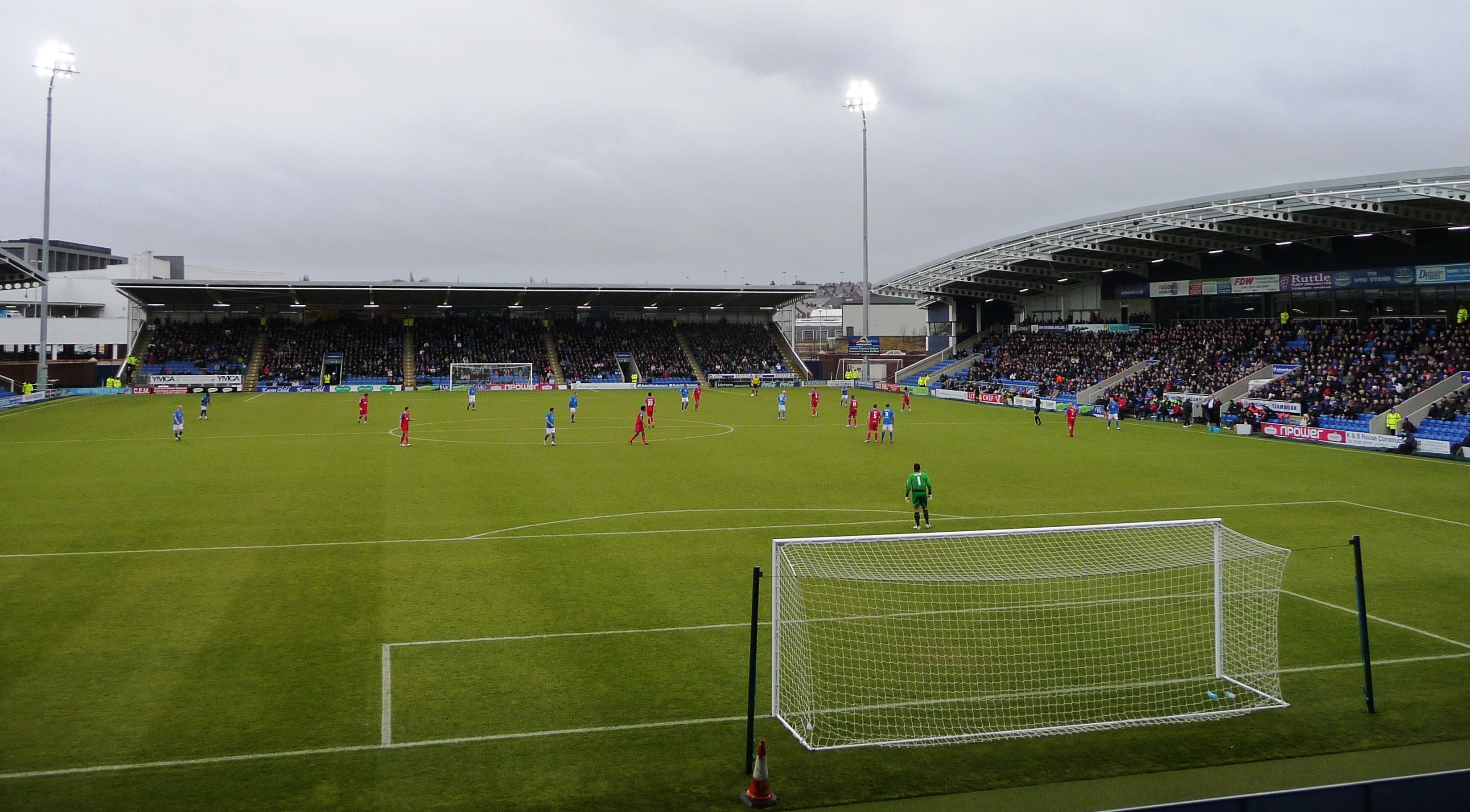 Chesterfield v Aldershot